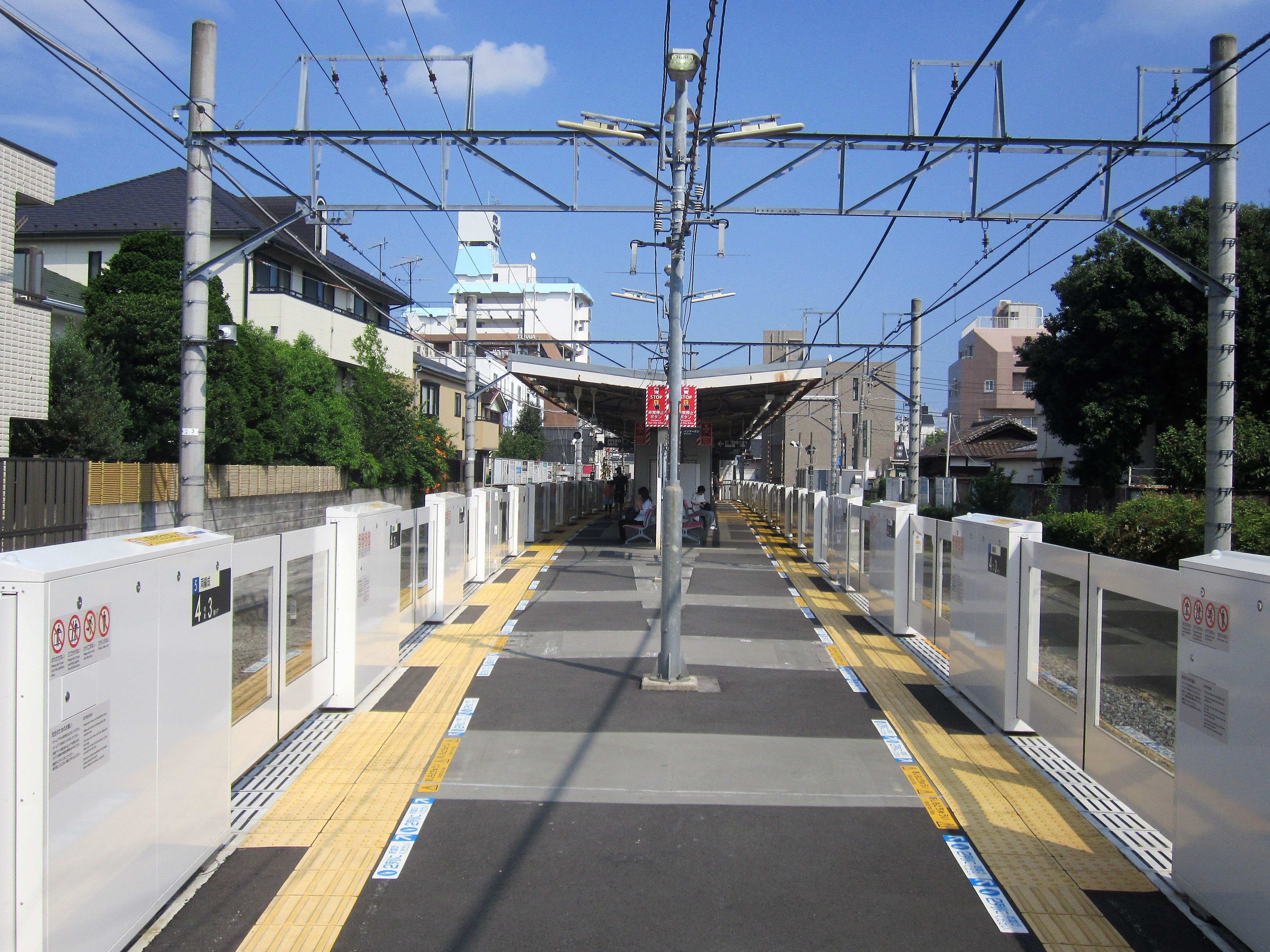 東急大井町線・九品仏駅ホーム